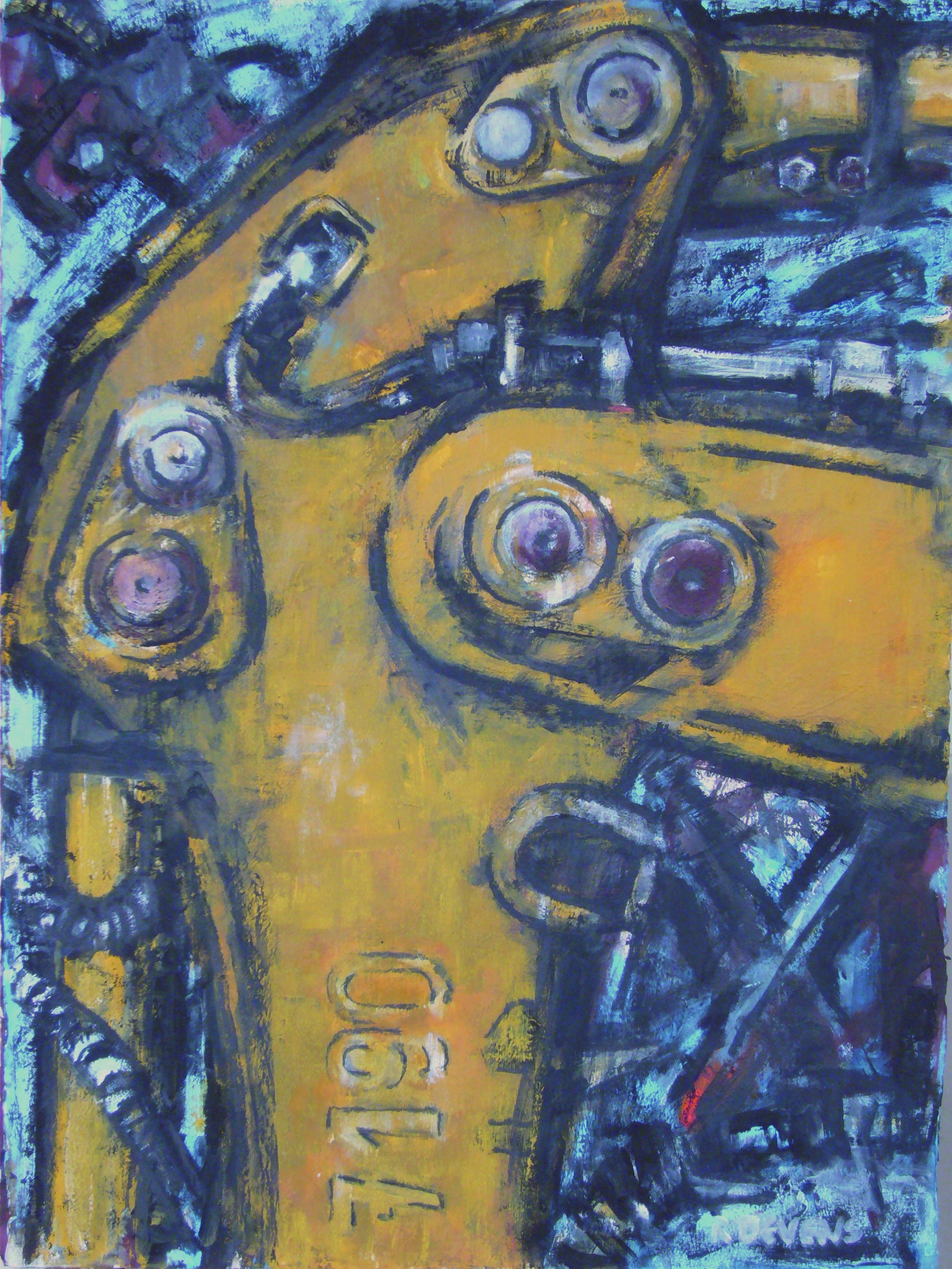 Rainer Devens: Schweres Gerät